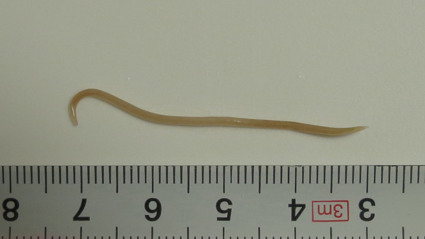 犬猫用粉末虫下しを飲み水に溶いて鳩に与えた数時間後排泄された回虫。